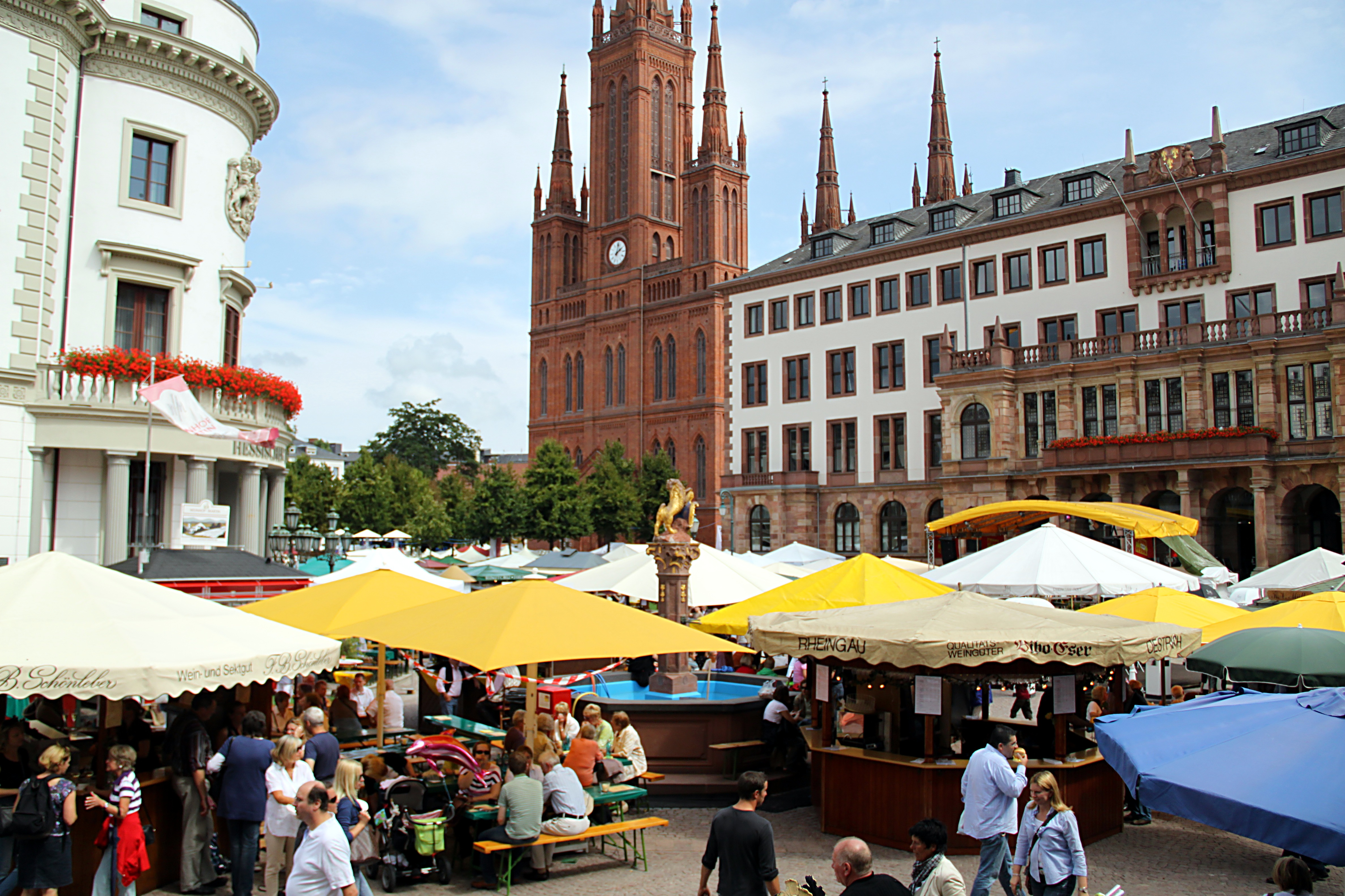 Rheingauer Weinwoche 2011 auf dem Schloßplatz in Wiesbaden.